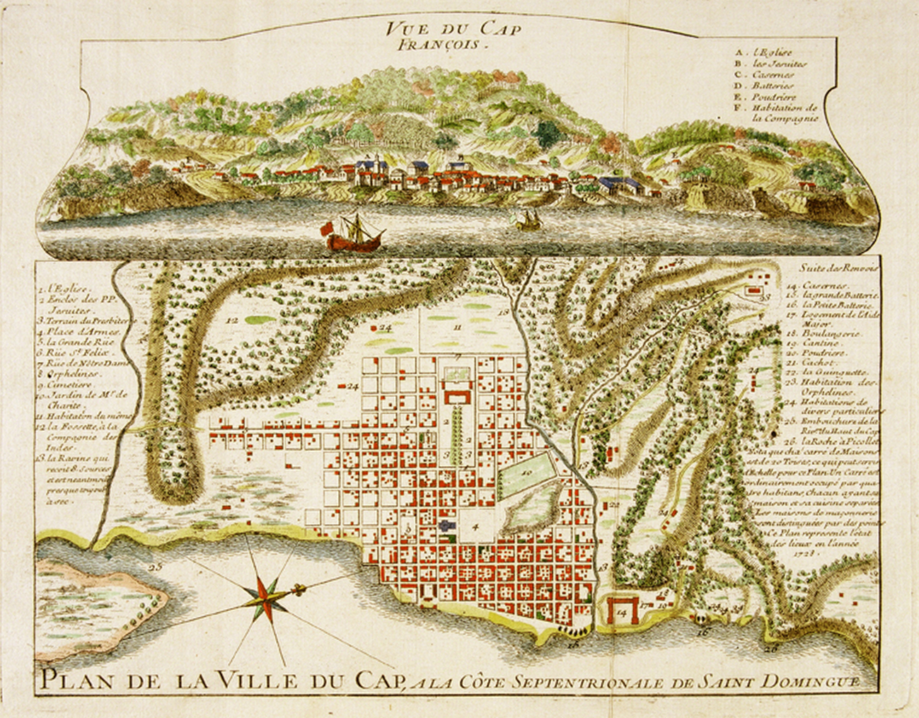 Gravure ancienne (1728) représentant la Cap Français